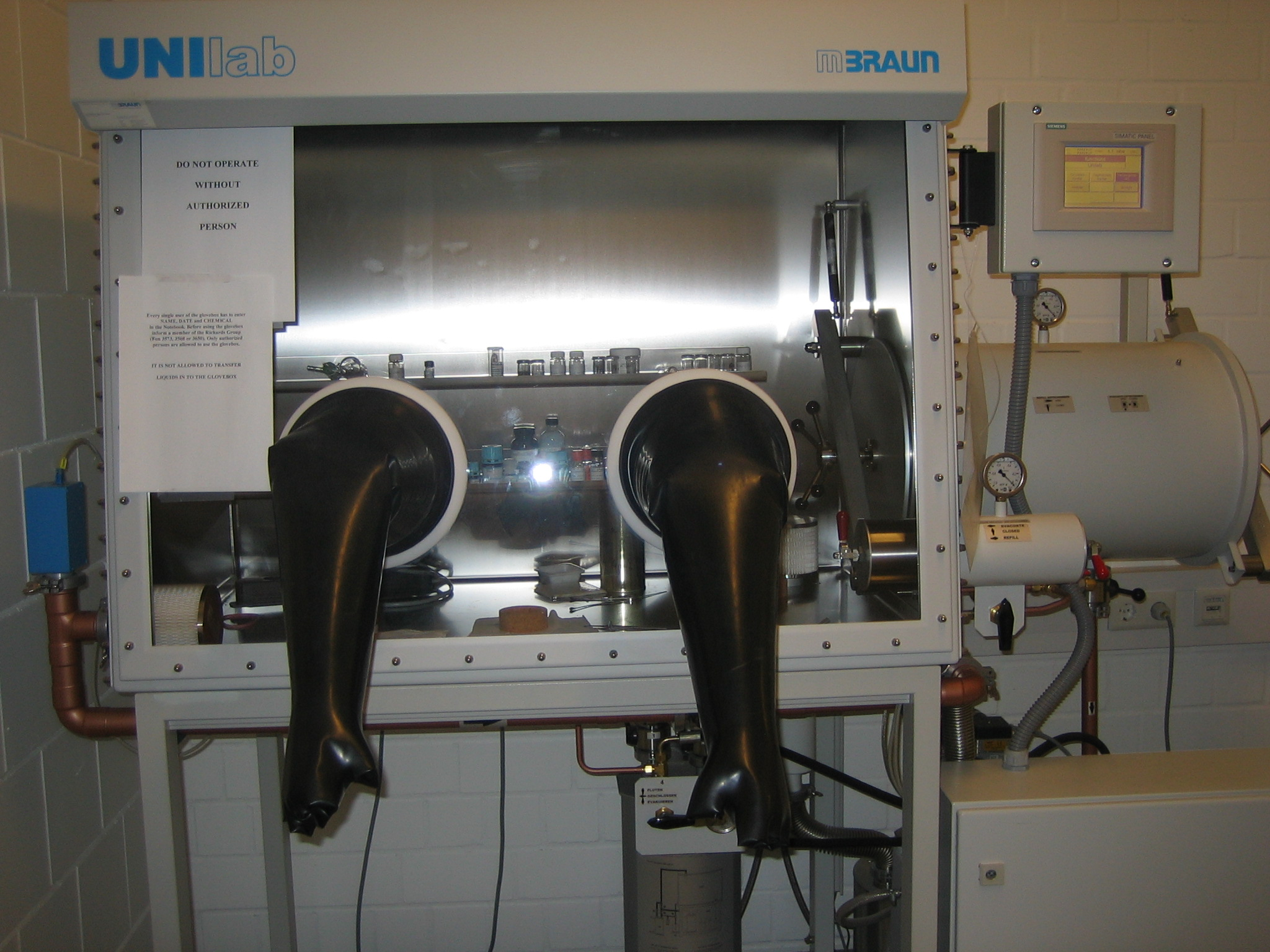 Glovebox